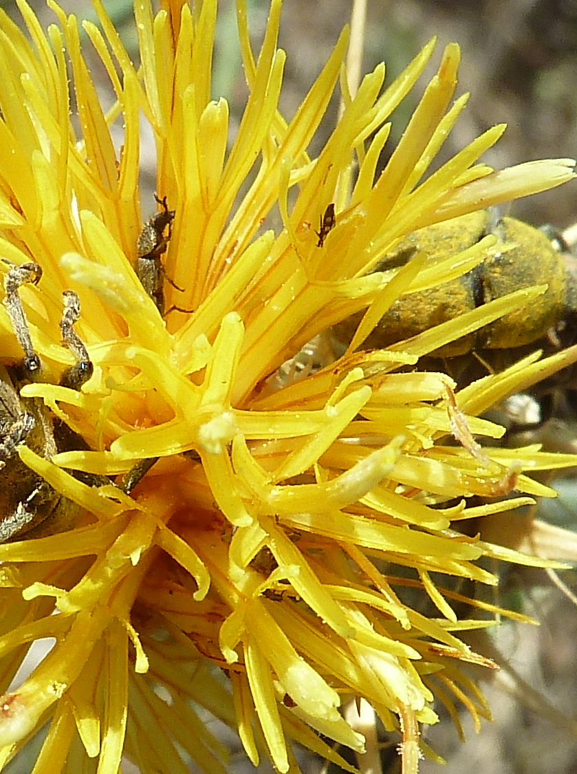 Centaurea ornata - Detalle de los flósculos internos hermafroditos, con corola de 5 lobulos algo desiguales - circa Estación FFCC RENFE/ADIF de contenedores de Abroñigal/Embajadores (Madrid, España).